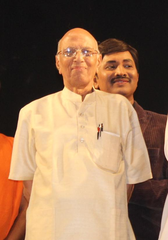 మొదలి నాగభూషణశర్మ